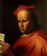 Ritratto del Cardinale Raniero Capocci